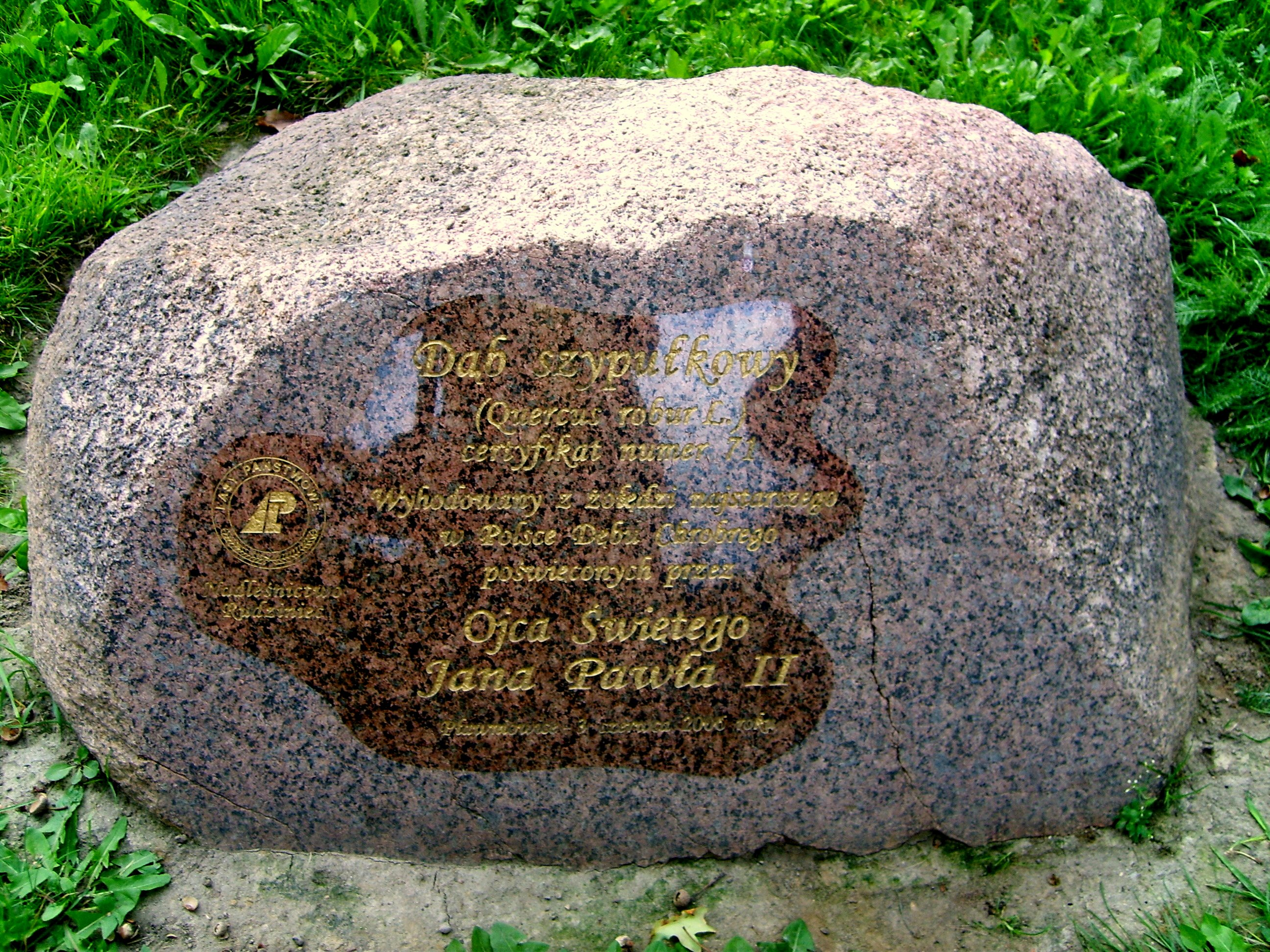 Zespół pałacowo-parkowy w Pławniowicach, głaz w pławniowickim parku. Zdjęcie wykonała 5 sierpnia 2007 r. Ilona Miłkoś i udzieliła zgody na jego wykorzystanie.